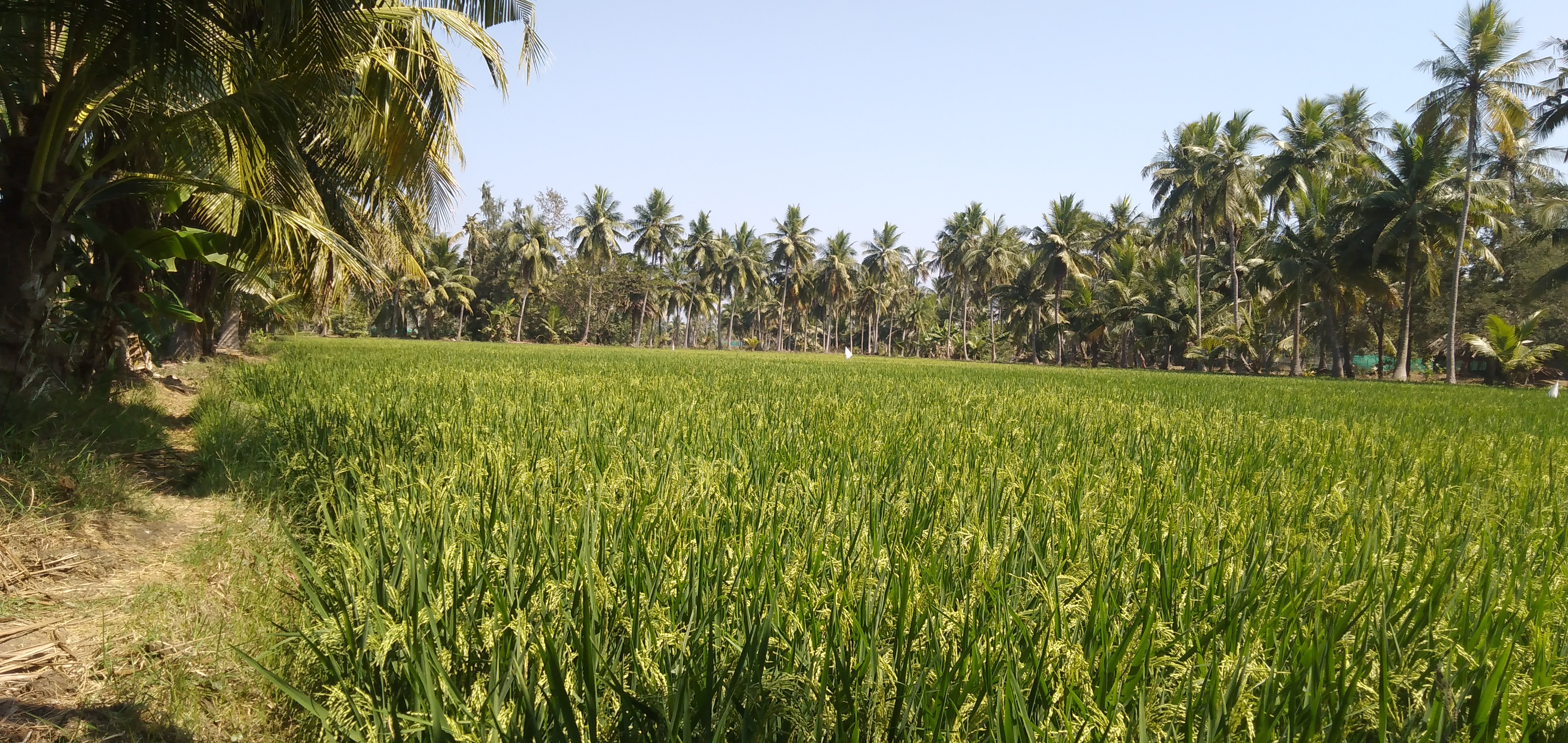 అమలాపురంలో వరి చేను